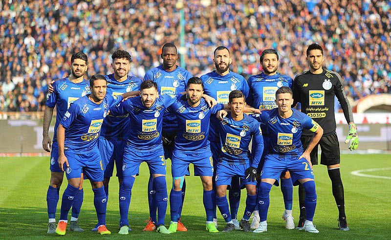 تصاویر دیدار استقلال و شهرخودرو در هفته سیزدهم لیگ برتر فوتبال ۹۹-۱۳۹۸ که استقلال با تک گل شیخ دیاباته پیروز دیدار شد.